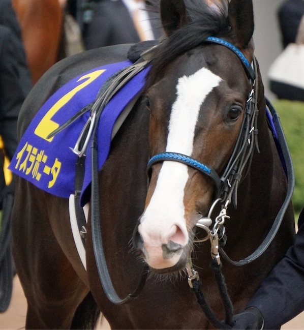 皐月賞のパドックより。